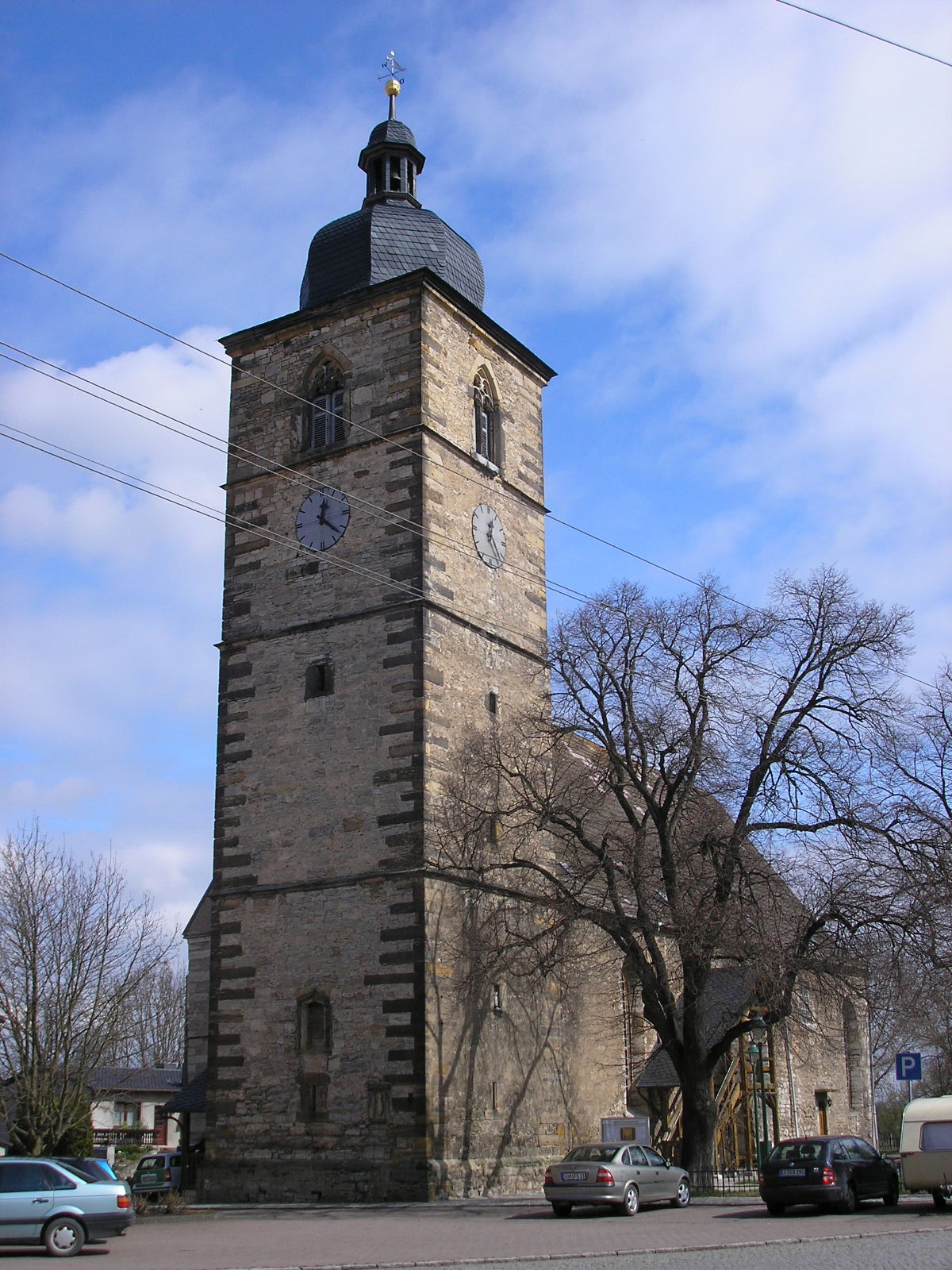 Die Stadtkirche in Gebesee (Thüringen).